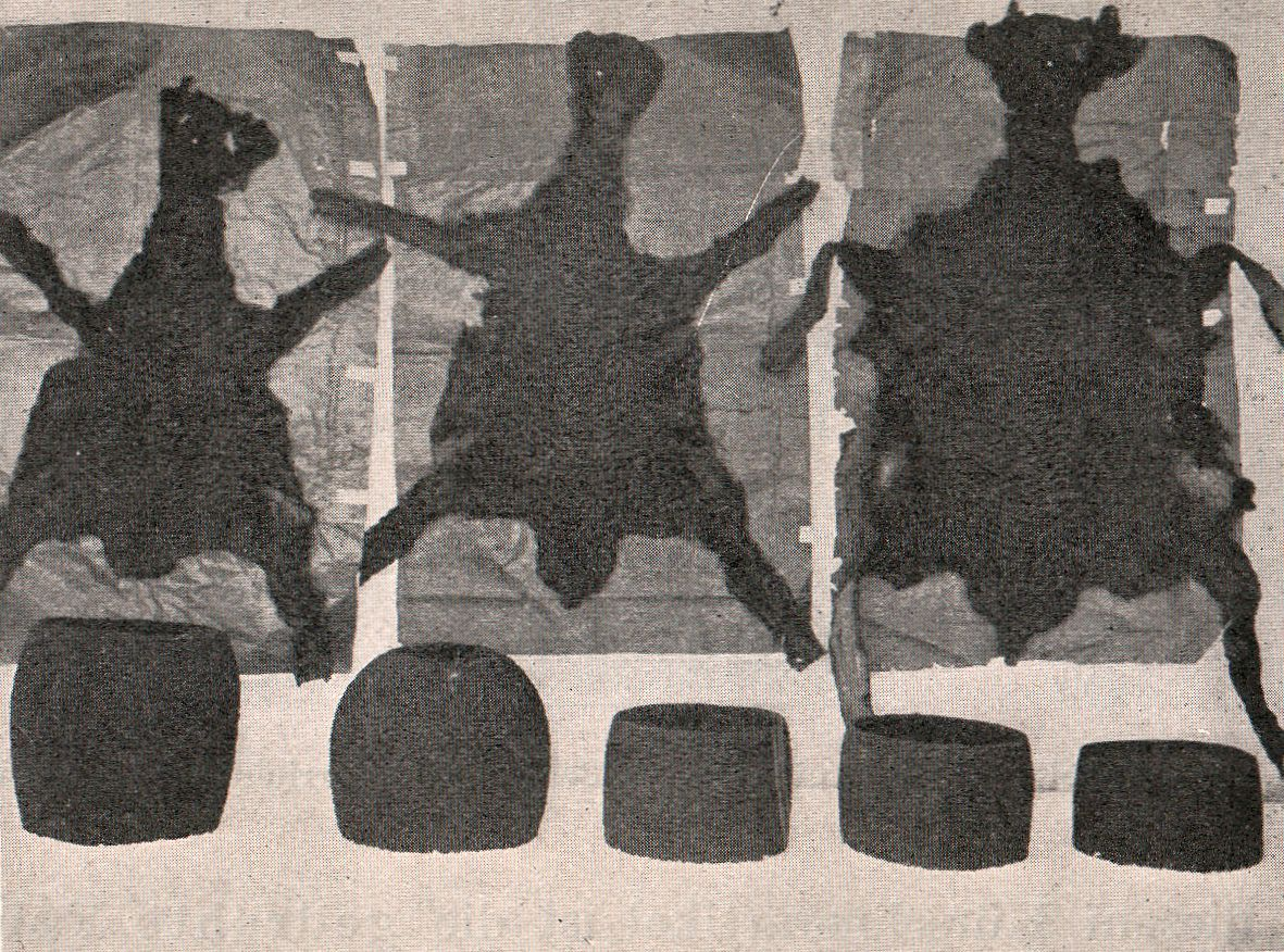 Aus H. Werner: Die Kürschnerkunst. Verlag Bernh. Friedr. Voigt, Leipzig. Bildunterschrift: Bucharische Lammfelle und daraus gefertigte 'Persianer'-Mützen.